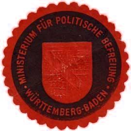 Siegelmarke des Ministeriums für politische Befreiung Württemberg-Baden mit dem Landeswappen als Siegelbild.